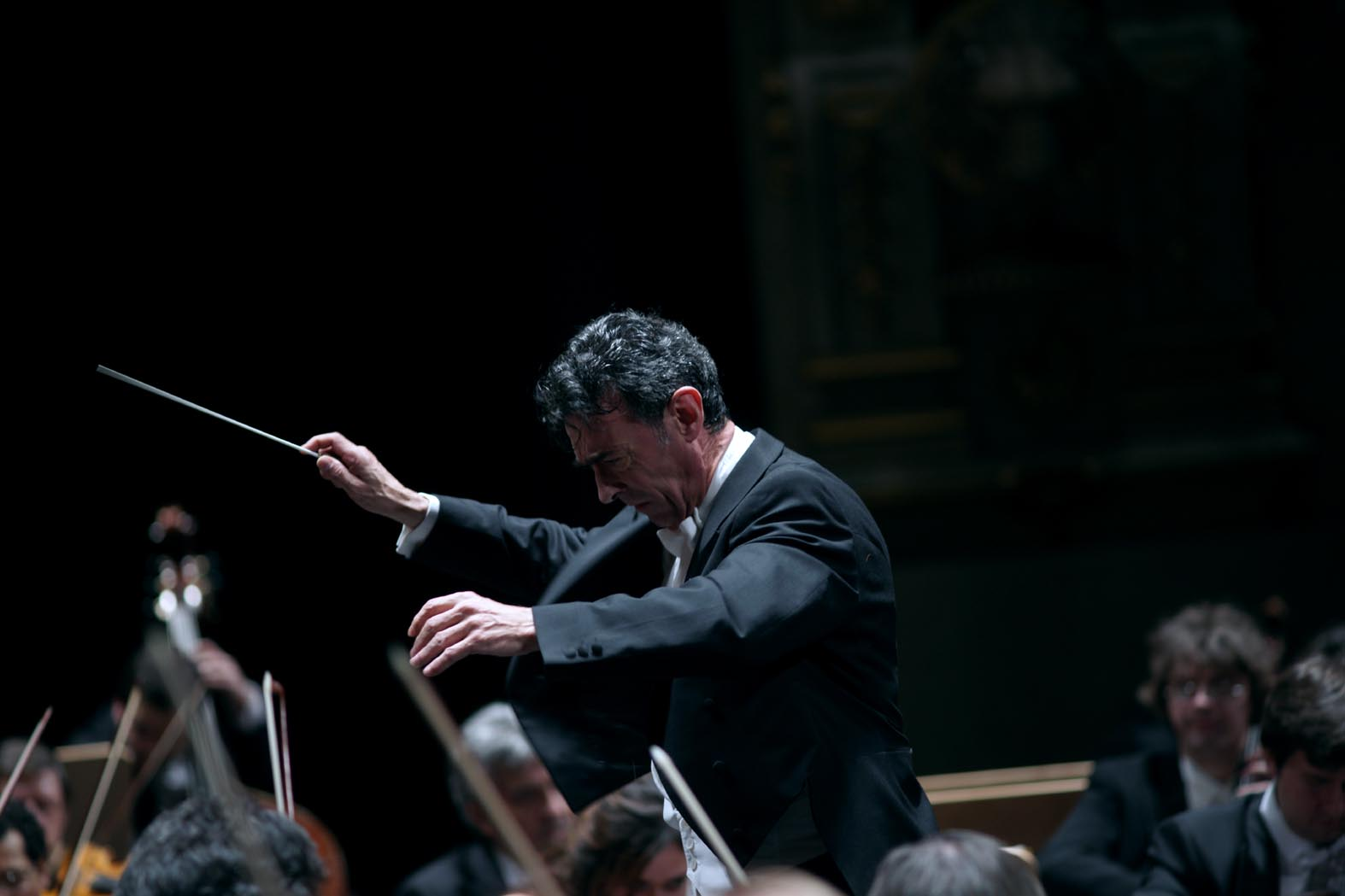 Miguel Ángel Gómez Martínez dirigiendo una orquesta